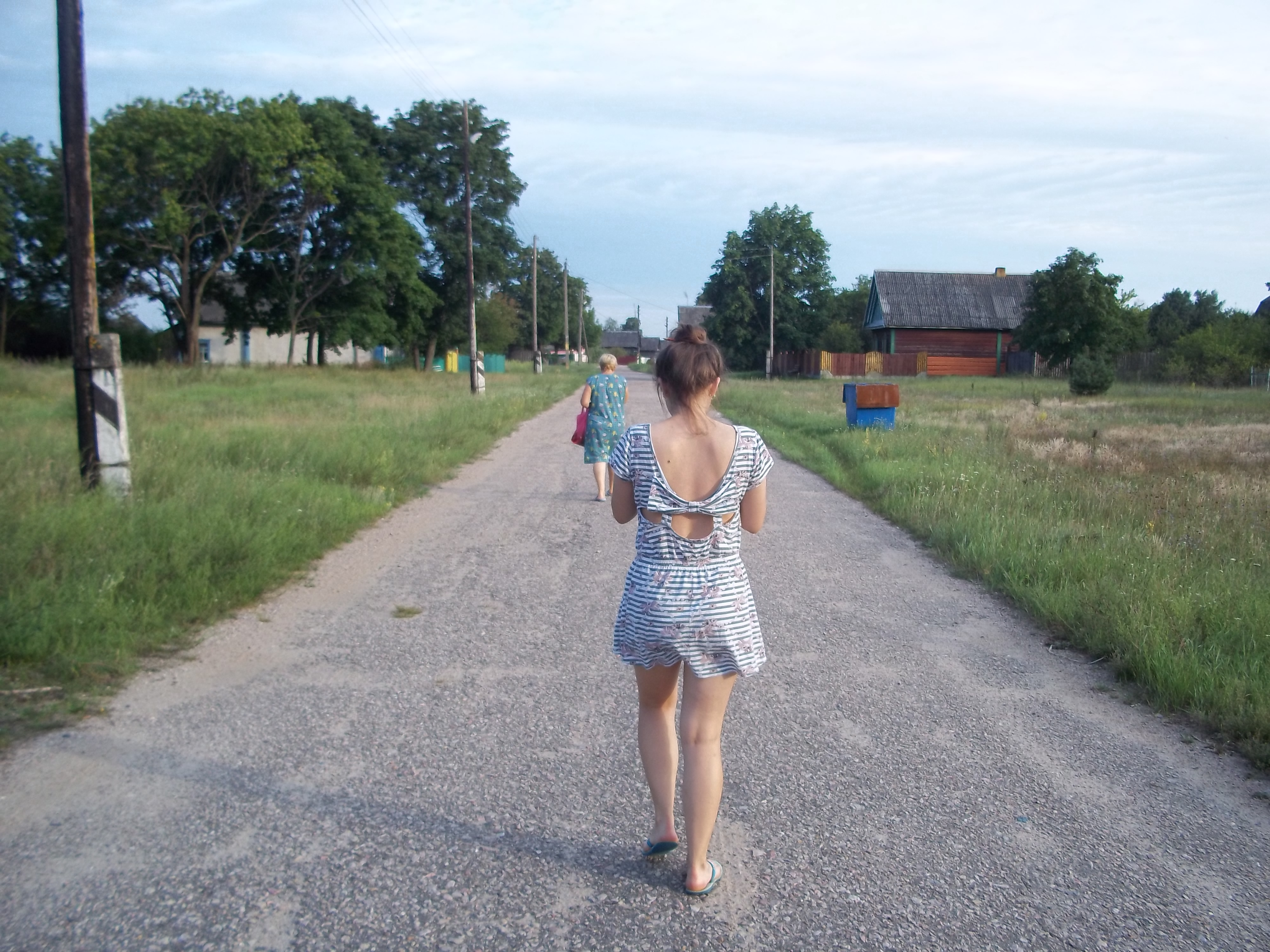 Фото сделано в 2018 году